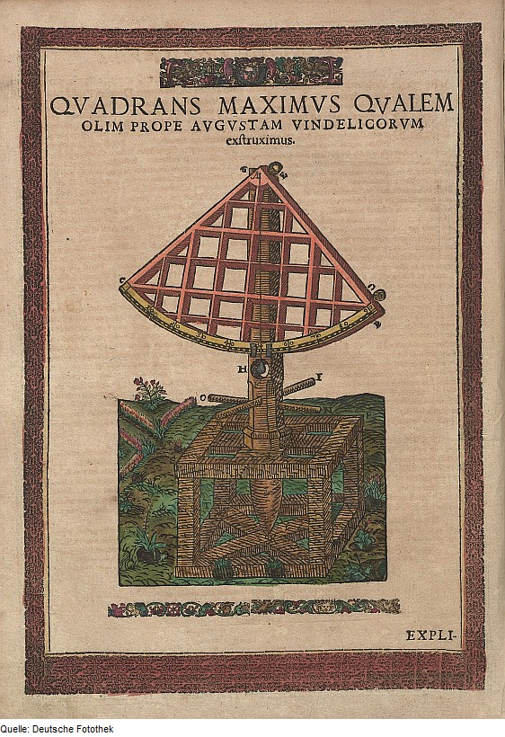 Original image description from the Deutsche Fotothek Astronomie & Vermessung & Messinstrument